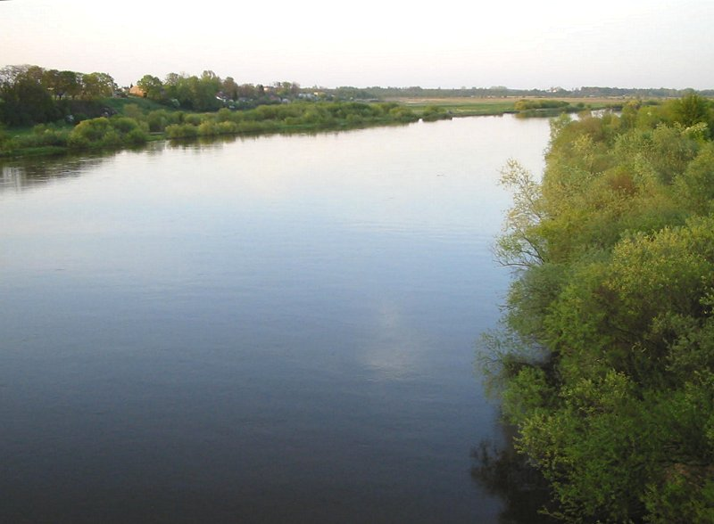 Rzeka Bug w Wyszkowie (widok z mostu samochodowego)